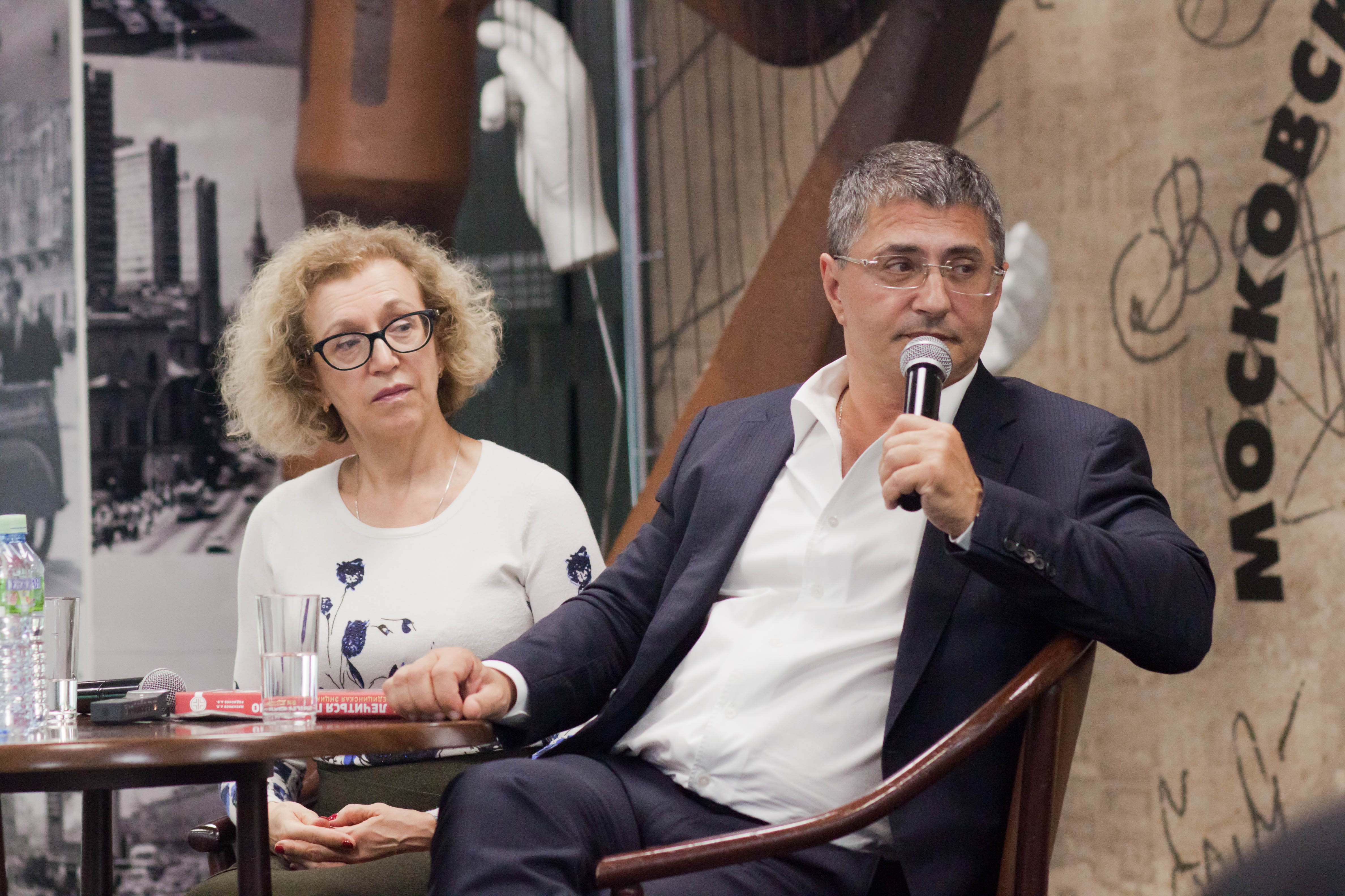 Александр Мясников и Ольга Шестова на презентации книги "Пора лечиться правильно" в Московском доме книги на Новом Арбате